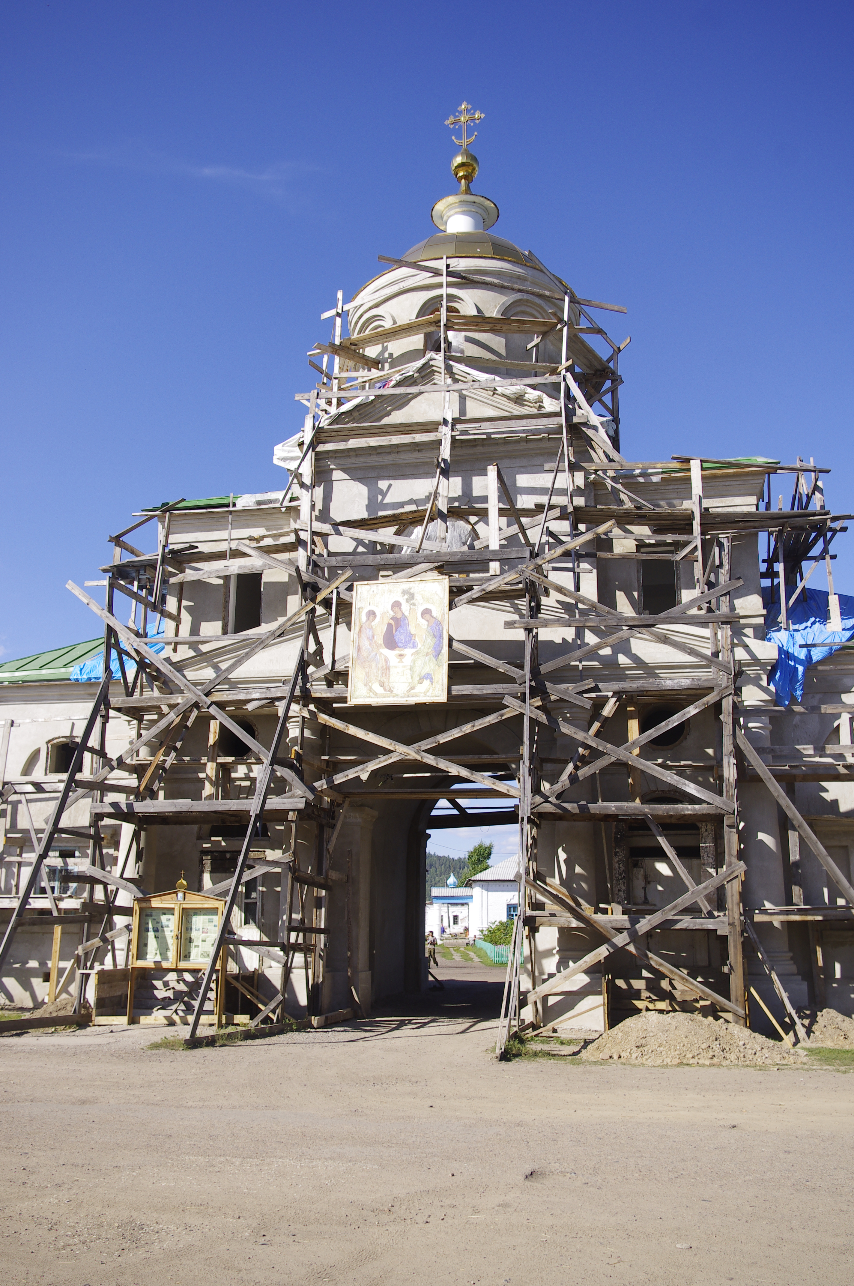 Lato 2013.